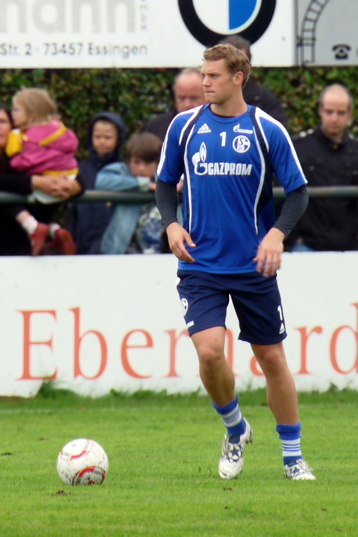 Manuel Neuer während einer Trainingseinheit